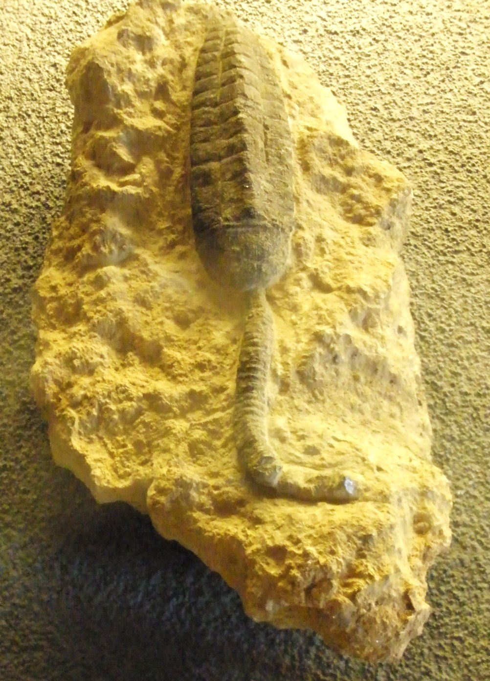 Fossil of Cupressocrinites, an extinct echinoderm - Took the photo at Naturalis museum, Leiden